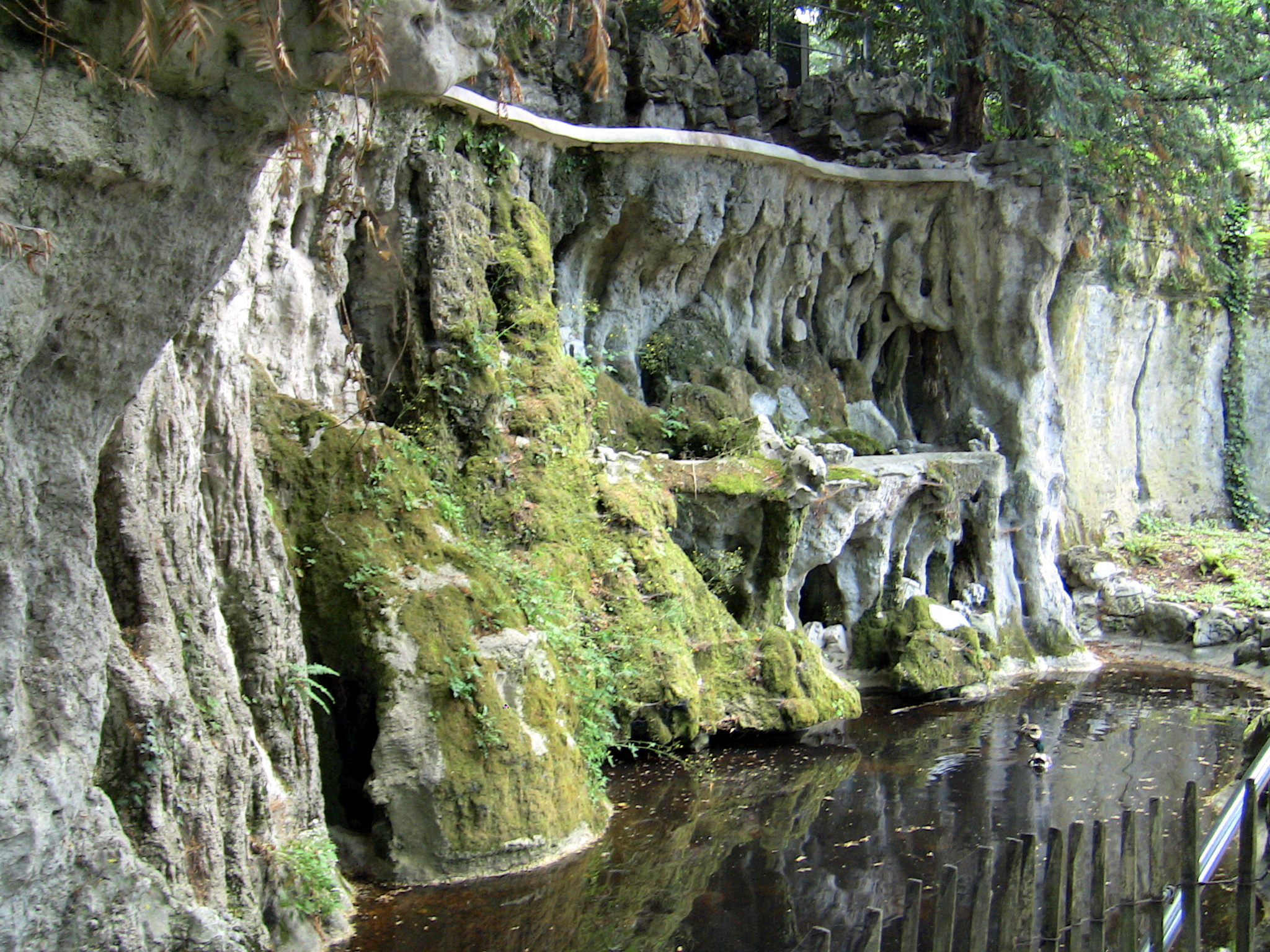 La cascade du parc Micaud à Besançon.